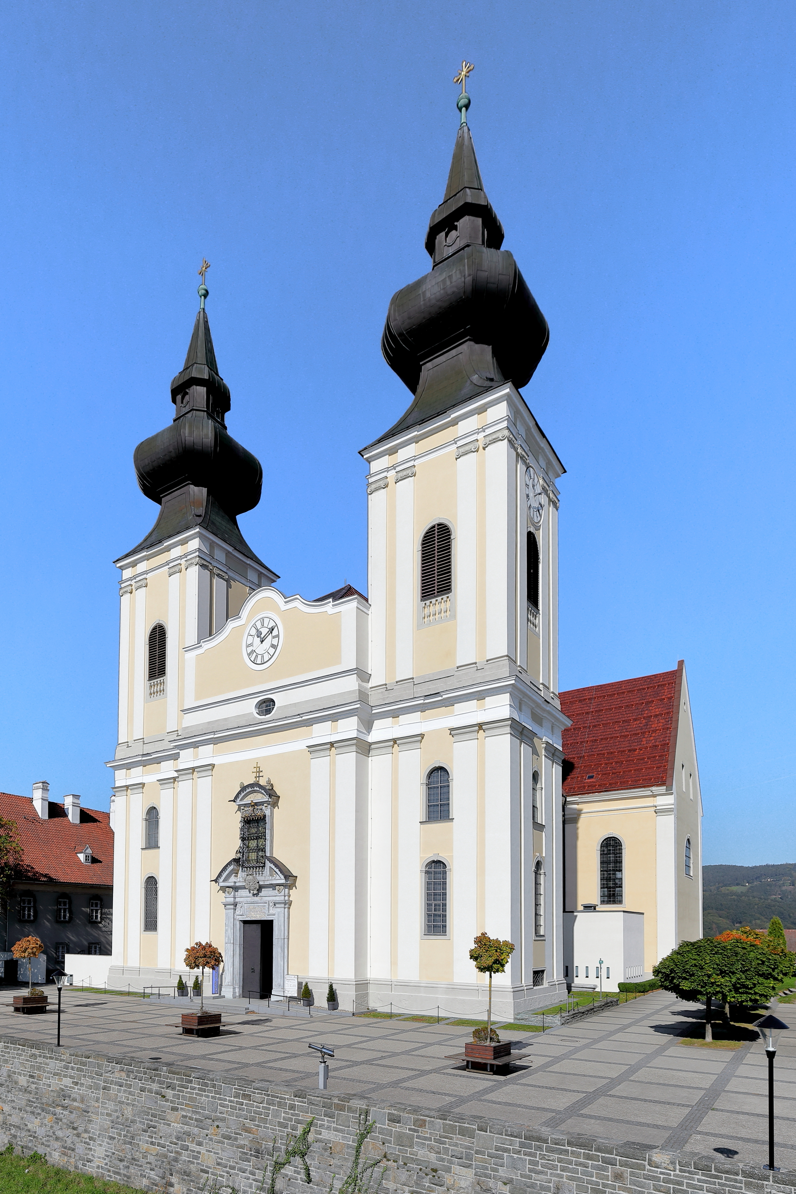 Südostansicht der Wallfahrtskirche Maria Taferl in der niederösterreichischen Marktgemeinde Maria Taferl. Die Wallfahrtskirche wurde ab 1660 errichtet und 1724 geweiht. Ab 2004 fand eine Generalsanierung in Etappen statt, die im Herbst 2018 abgeschlossen wurde.